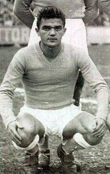 Joseph Ujlaki en 1950-1951 (Nîmes Olympique ), 'Football 78 - 'Les étoiles du passé', Panini figurina.